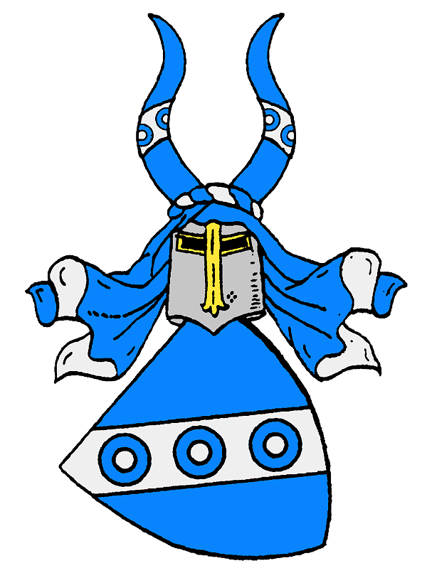 Stammwappen derer von Echter